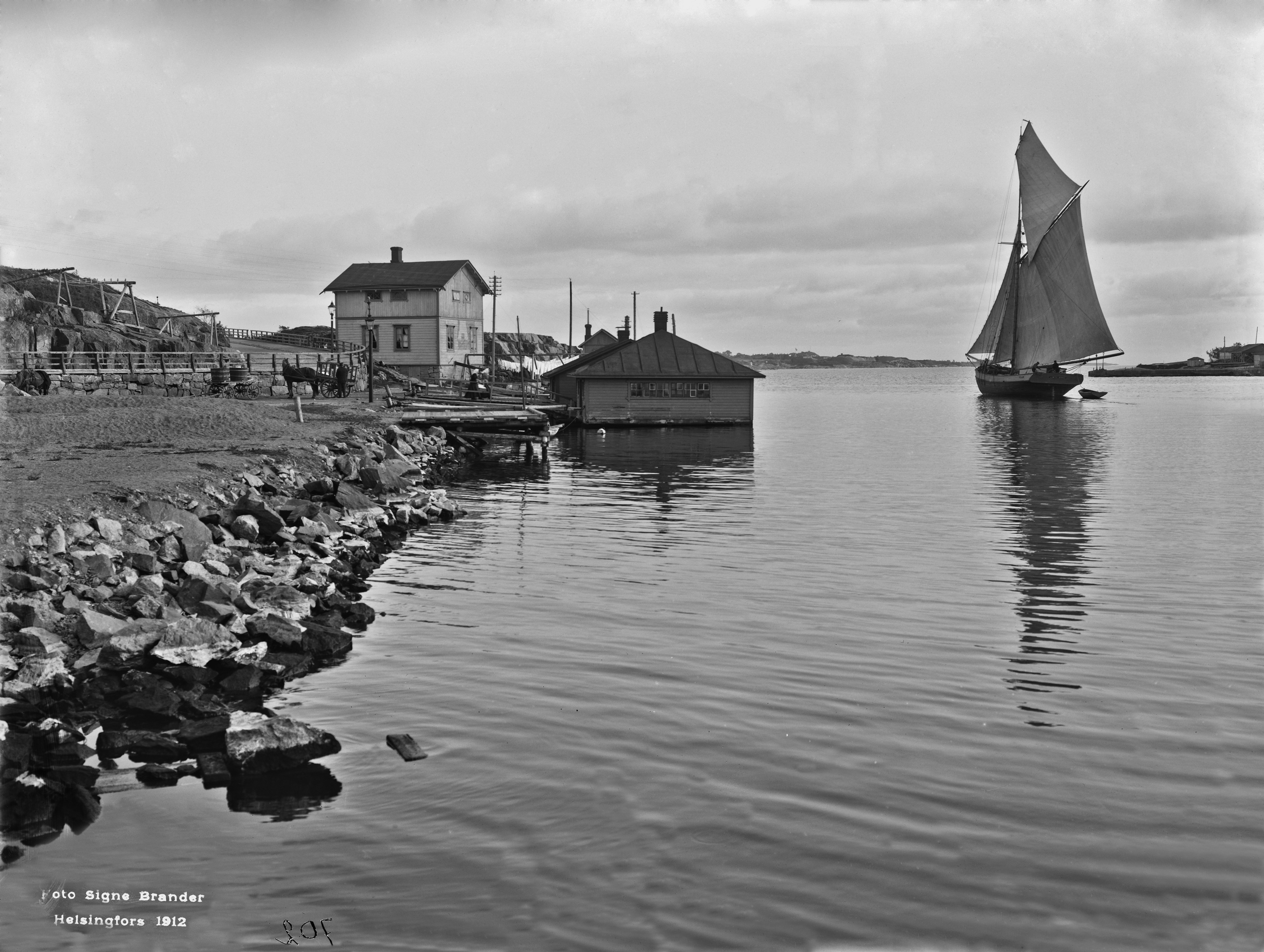 Kaivopuiston eteläranta ja Uunisaarensalmi.; negatiivi ja vedos, lasi paperi pahvi, mv